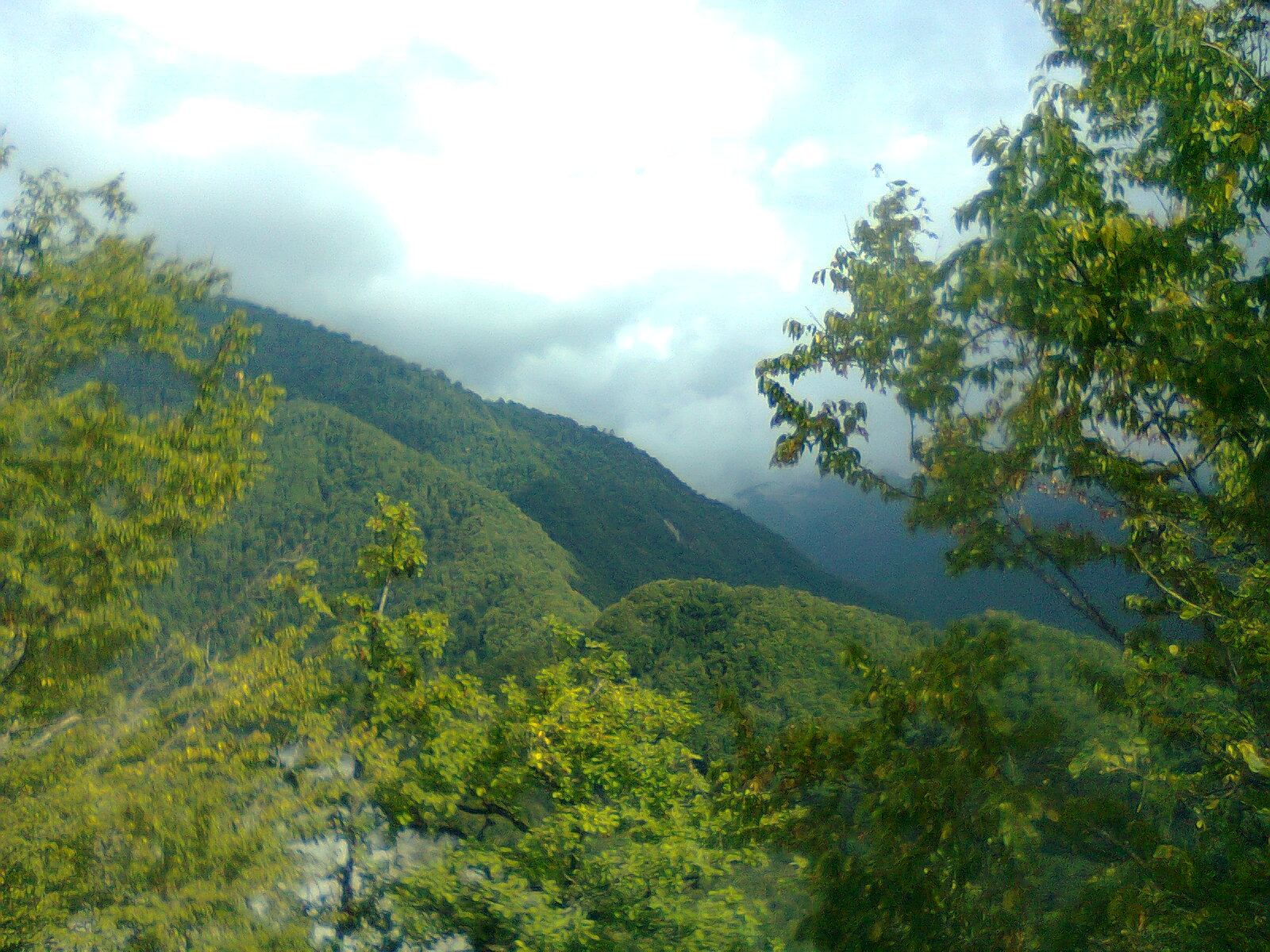 Şəki, Gələrsən-görərsən qalası